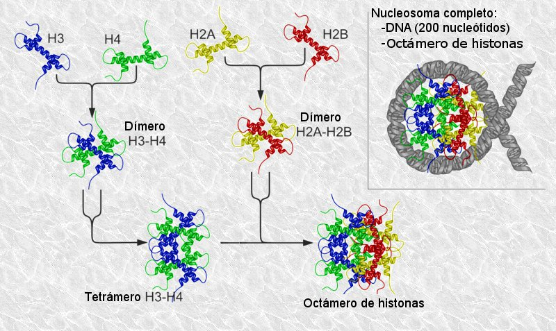 Estructura del nucleosma.